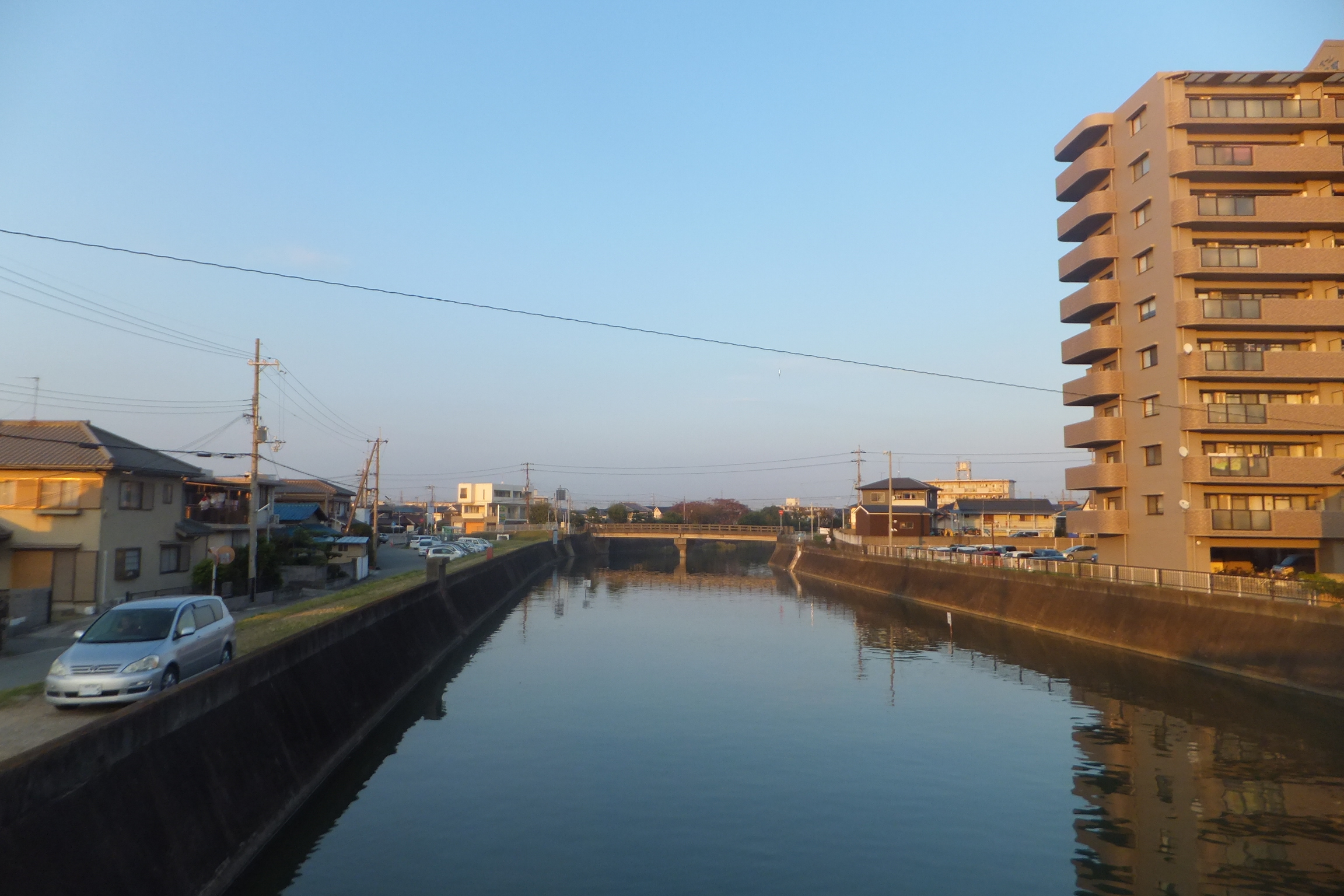 兵庫県加古郡播磨町本荘 喜連川